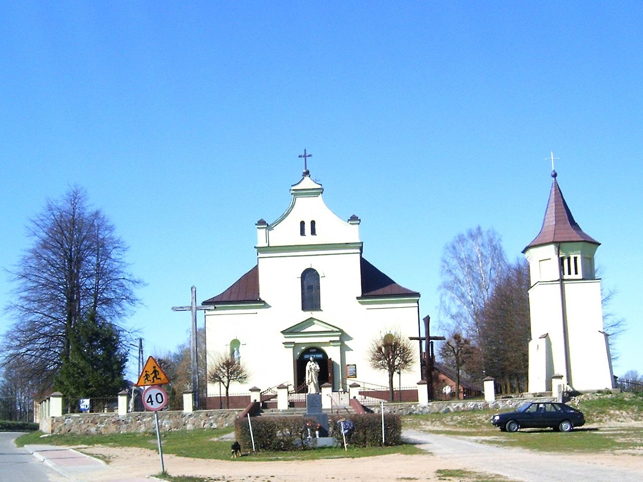 Kościół Rzymskokatolicki pod Wezwaniem Niepokalanego Poczęcia Najświętszej Maryi Panny we wsi Nieciecz Włościańska.